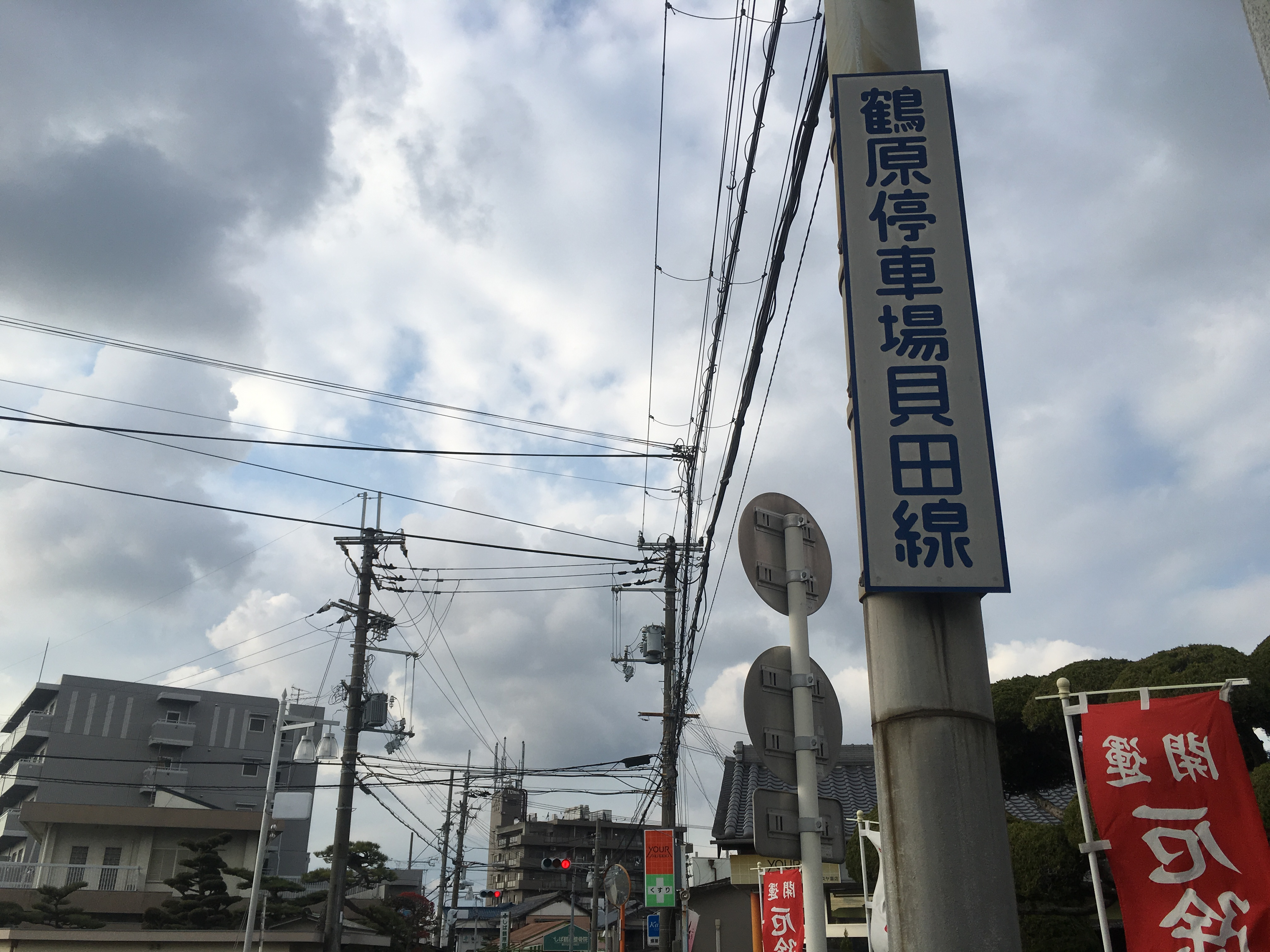 大阪府道241号路線内に残る旧称の標識